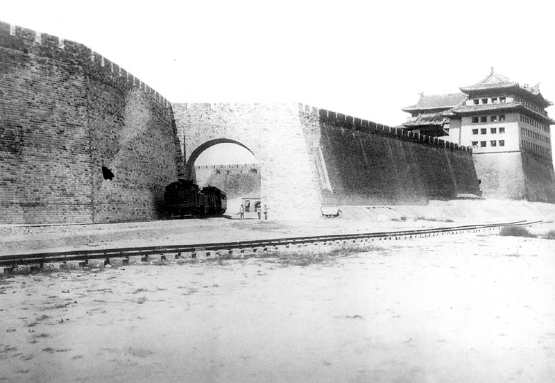 北京内城东南角箭楼（即外城东北角附近）